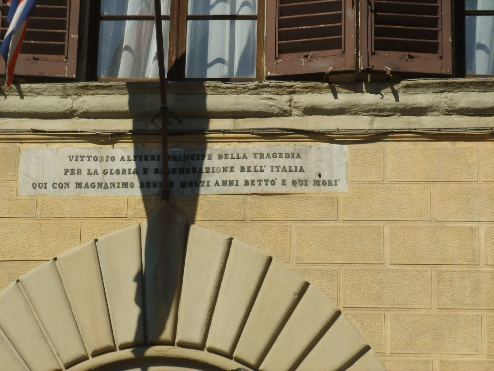 Palazzo Gianfigliazzi a Firenze, iscrizione che commemora il soggiorno e la morte nel palazzo di Vittorio Alfieri.